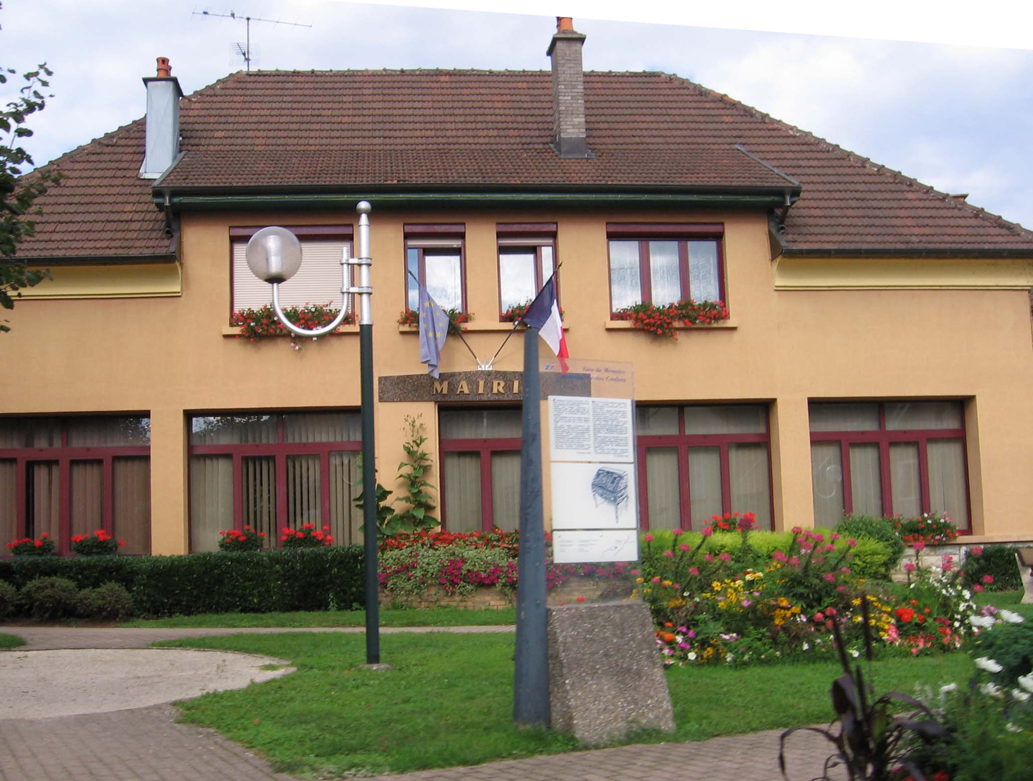 Bart, France